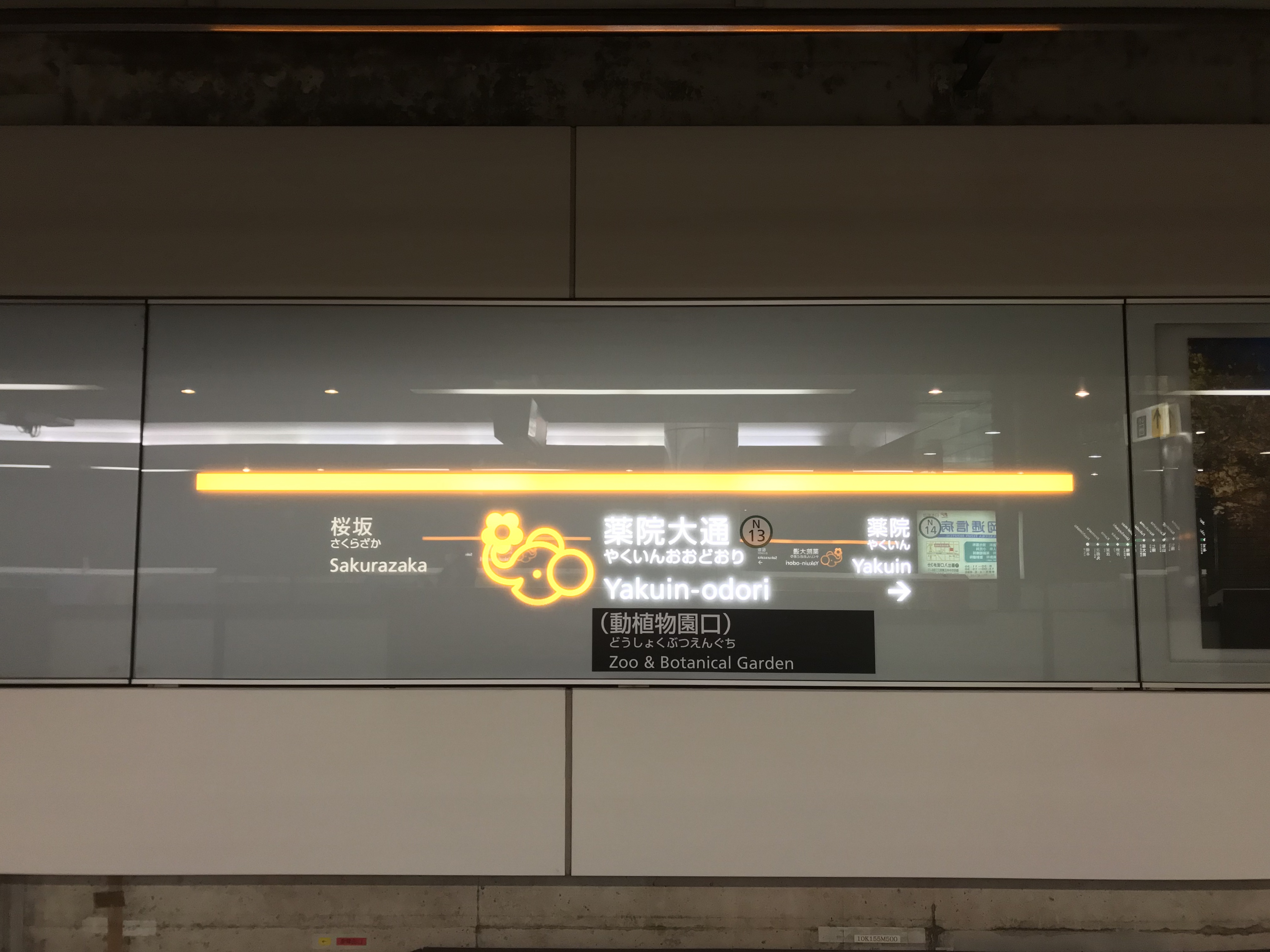 薬院大通駅の駅名標。イラストはゾウと花